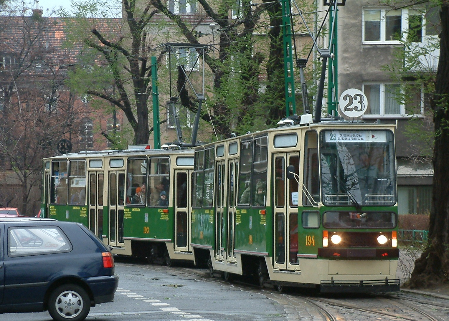 Konstal 105N in Poznań